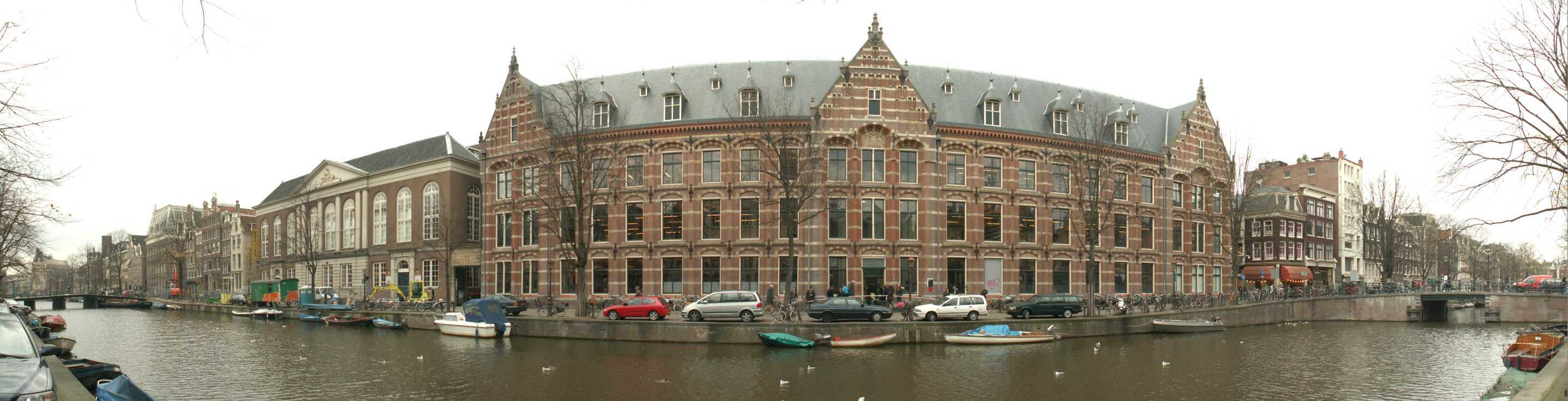 Kloveniersburgwal Amsterdam (westzijde)